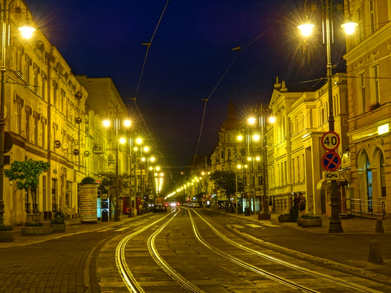 Ulica Gdańska w Bydgoszczy